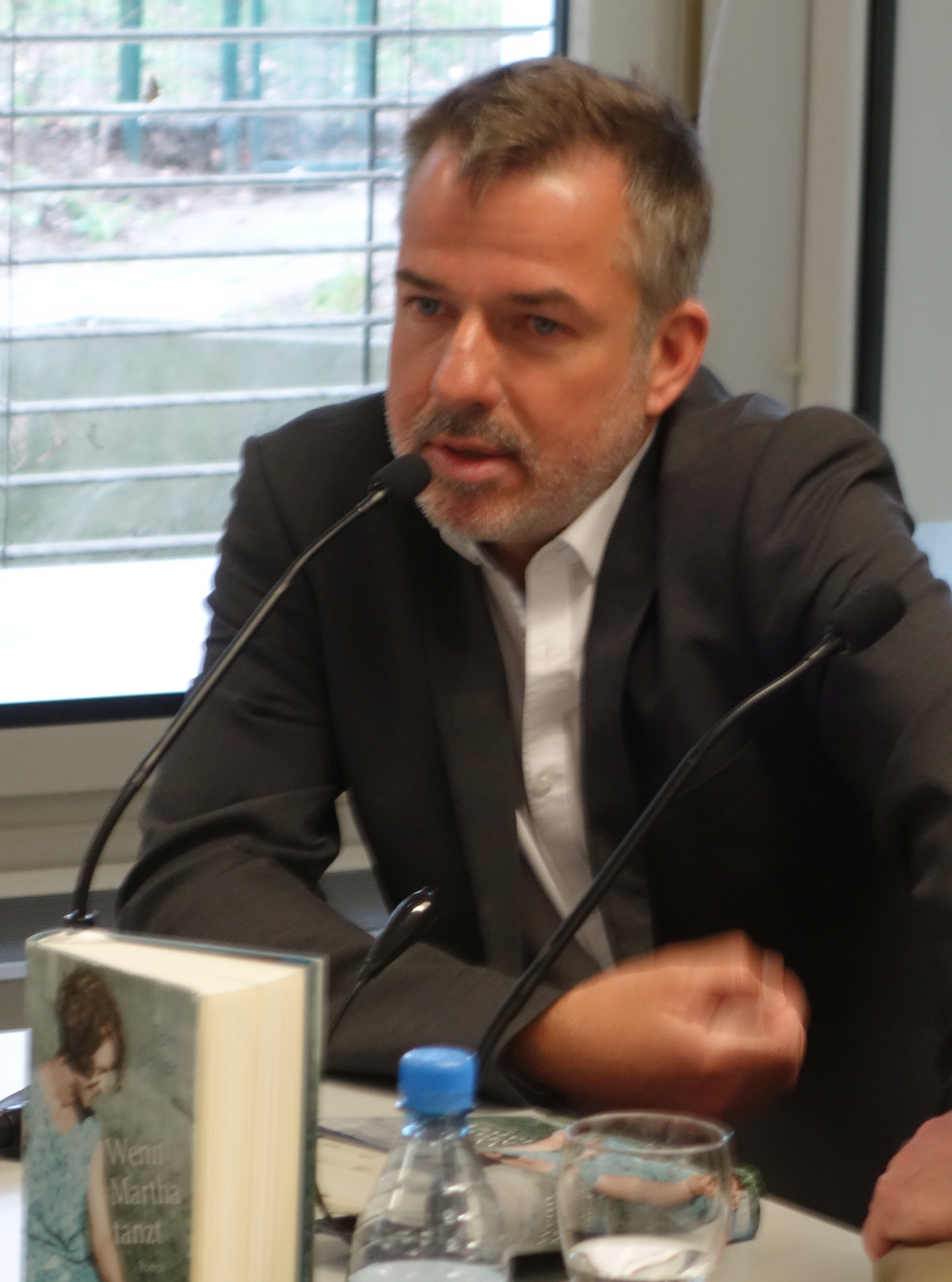 Tom Saller liest aus seinem Debutroman „Wenn Martha tanzt“, 9. April 2019 in der Zentralbibliothek Düsseldorf.